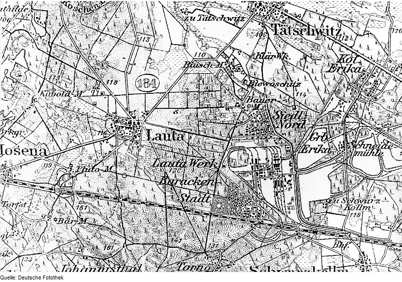 Original image description from the Deutsche Fotothek Lauta. Reichskarte, 1:100.000, Einheitsblatt Nr. 89, 1922